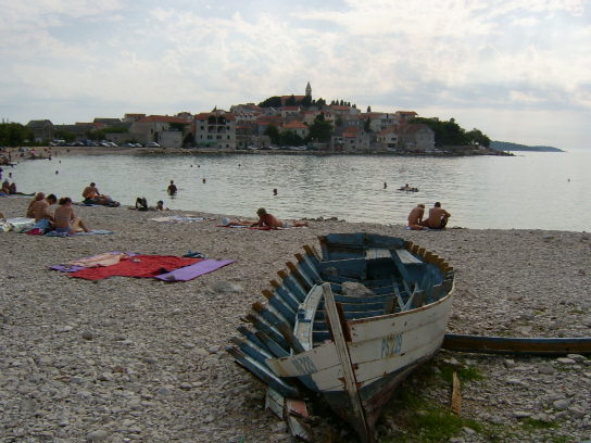 Vidaĵo al Primoŝteno Primosten (memfarita foto libere uzebla)